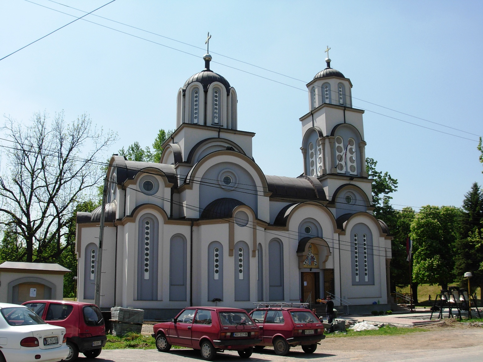 Crkva Svetog Vasilija Ostroškog u Beočinu.